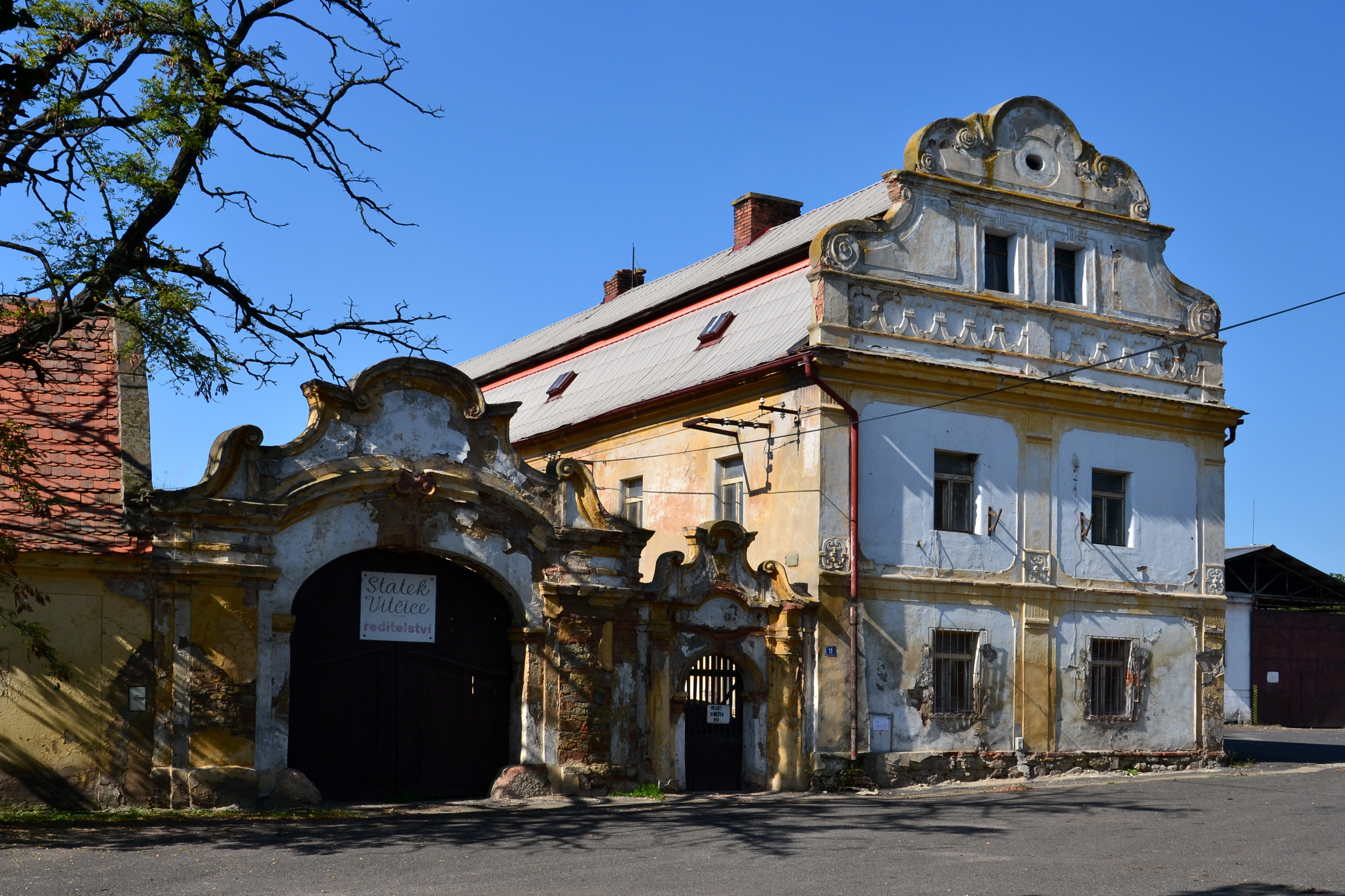 Venkovská usedlost (Vitčice), Vitčice 13